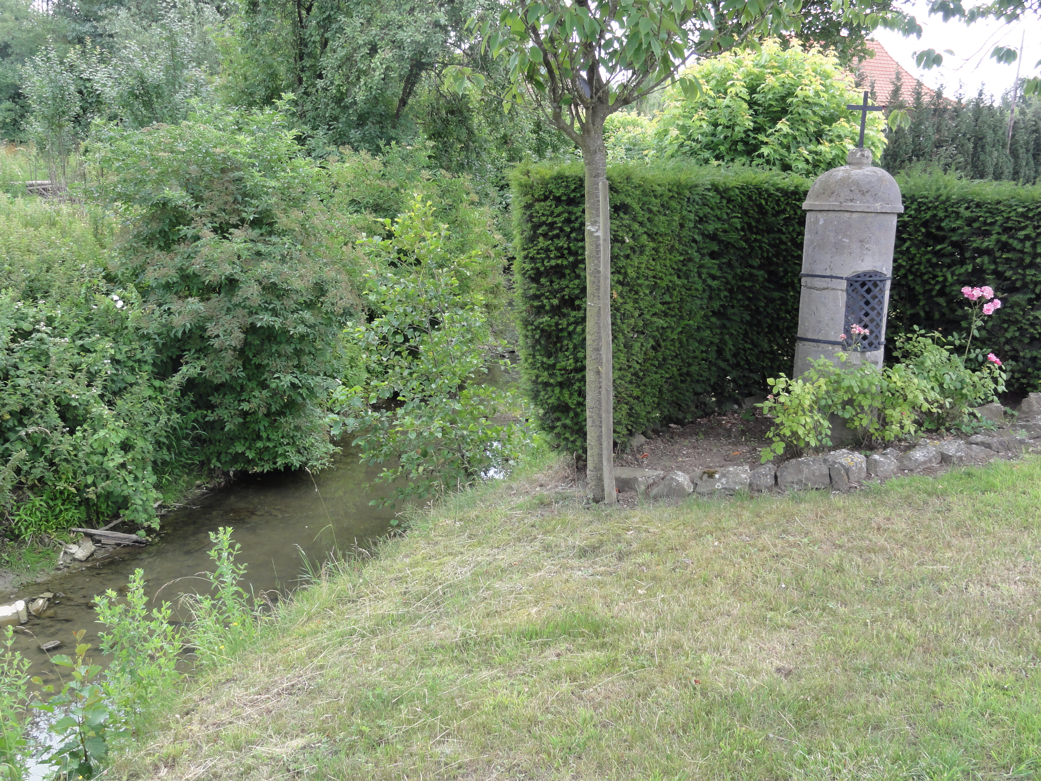 Barzy-en-Thiérache (Aisne, Fr) chapelle au bord de la Sambre